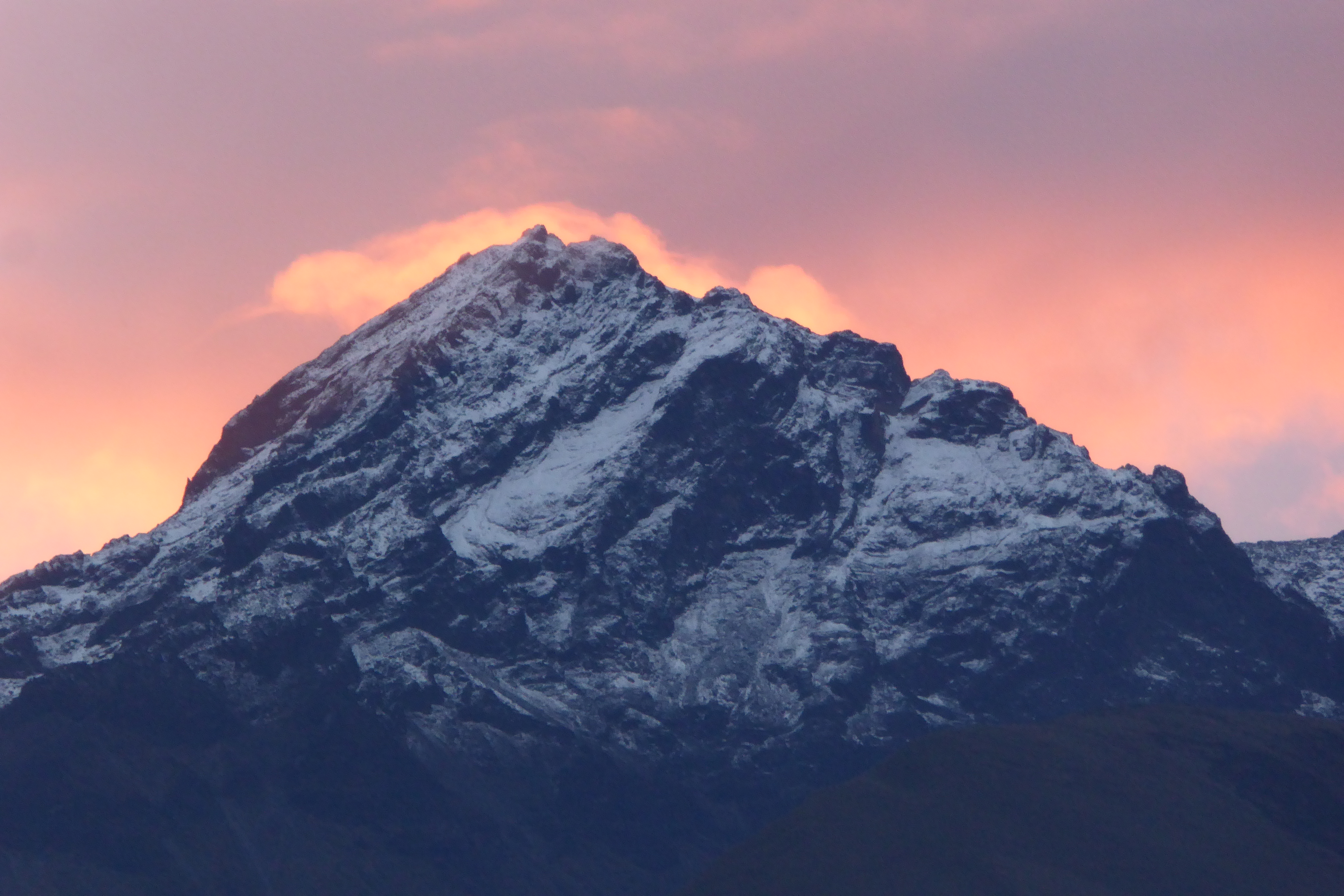 Abenddämmerung auf dem verschneiten Cotacachi